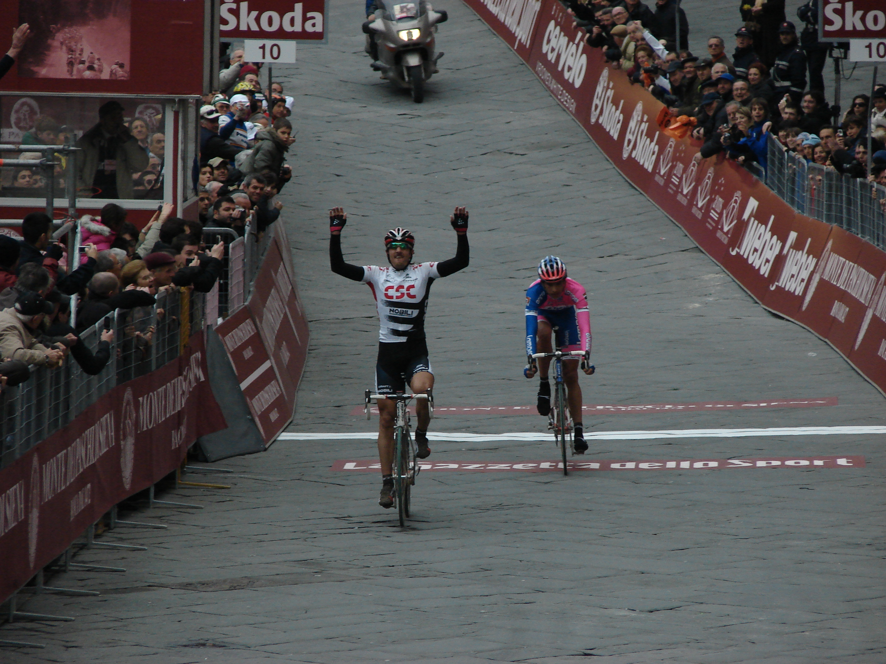 L'arrivo dell'edizione 2008 della Montepaschi Eroica